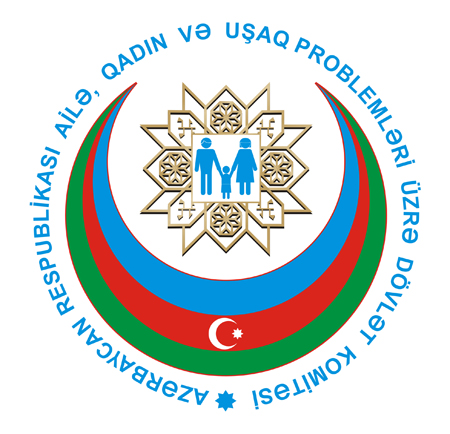 Azərbaycan Respublikası Ailə, Qadın və Uşaq Problemləri üzrə Dövlət Komitəsinin loqosu